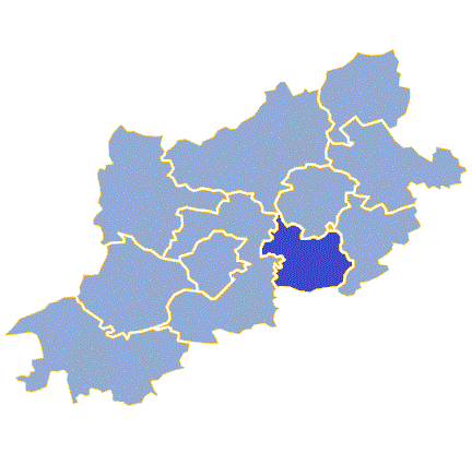 Powiat zielonogórski - Gmina Zabór